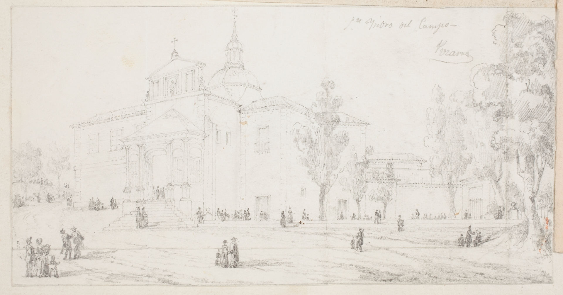 Ermita de San Isidro de Madrid (1840-1873). Lápiz compuesto sobre papel avitelado. Museo del Prado, Madrid, España